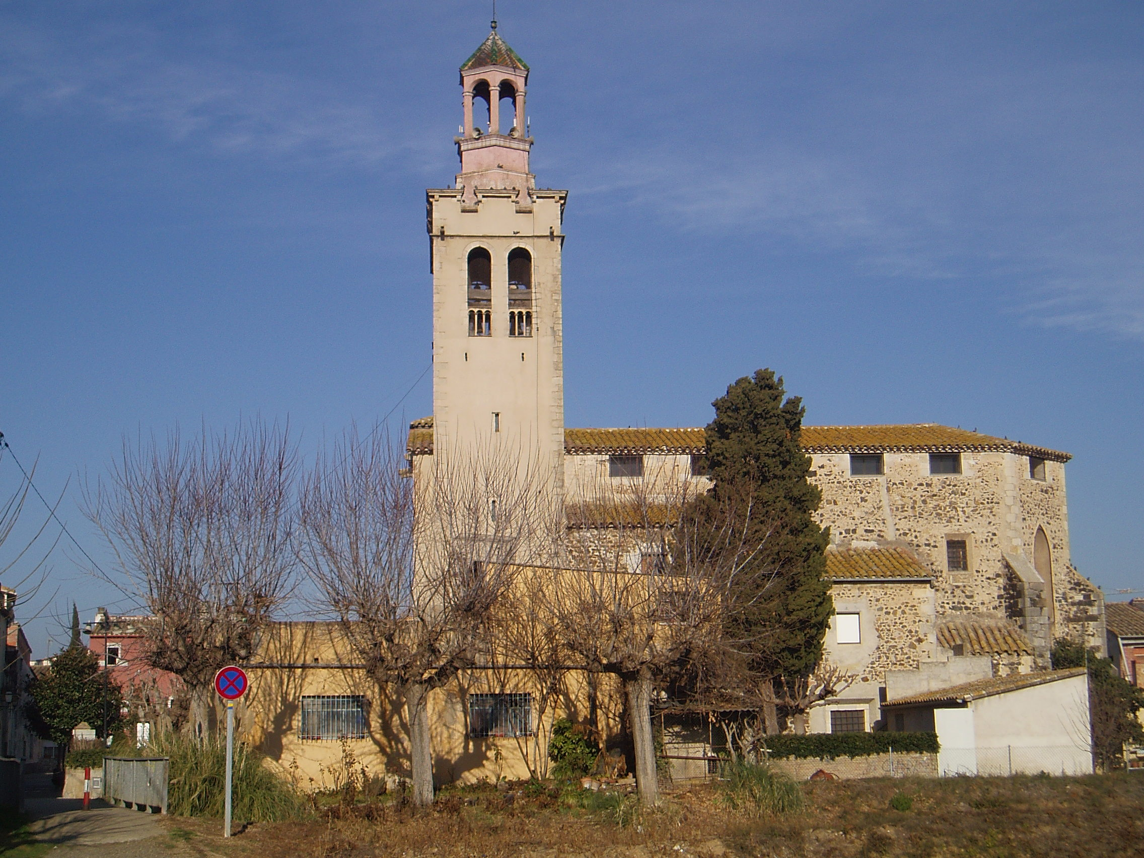 Imatge de l'església de Riudellots de la Selva